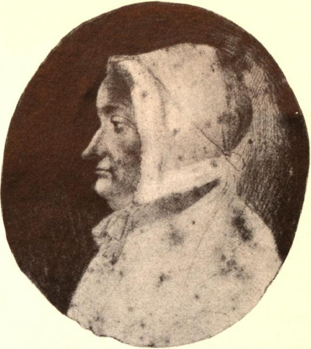 Luise Duttenhofer: (nach einer Vermutung von Manfred Koschlig:) Johanna Christiana Spittler geb. Bilfinger, 1724-1796, Großmutter von Luise Duttenhofer, Ovalmedaillon mit Brustbild im Profil, Kreidezeichnung, ohne Jahr.